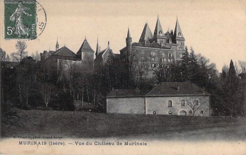 Carte postale ancienne. Château de Murinais, Isère.